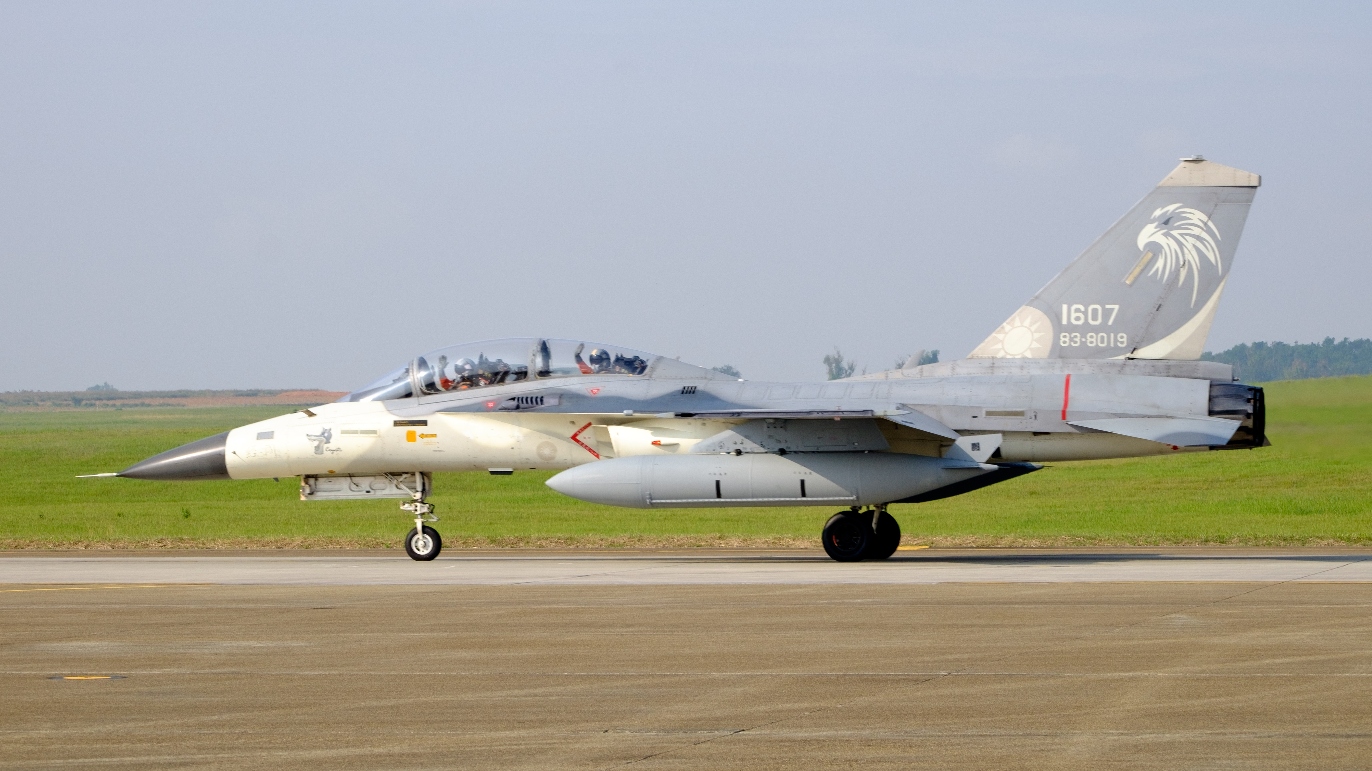 2016年空軍清泉崗基地營區開放活動，衝場結束降落清泉崗基地後，通過會場外的427聯隊F-CK-1B 1607。